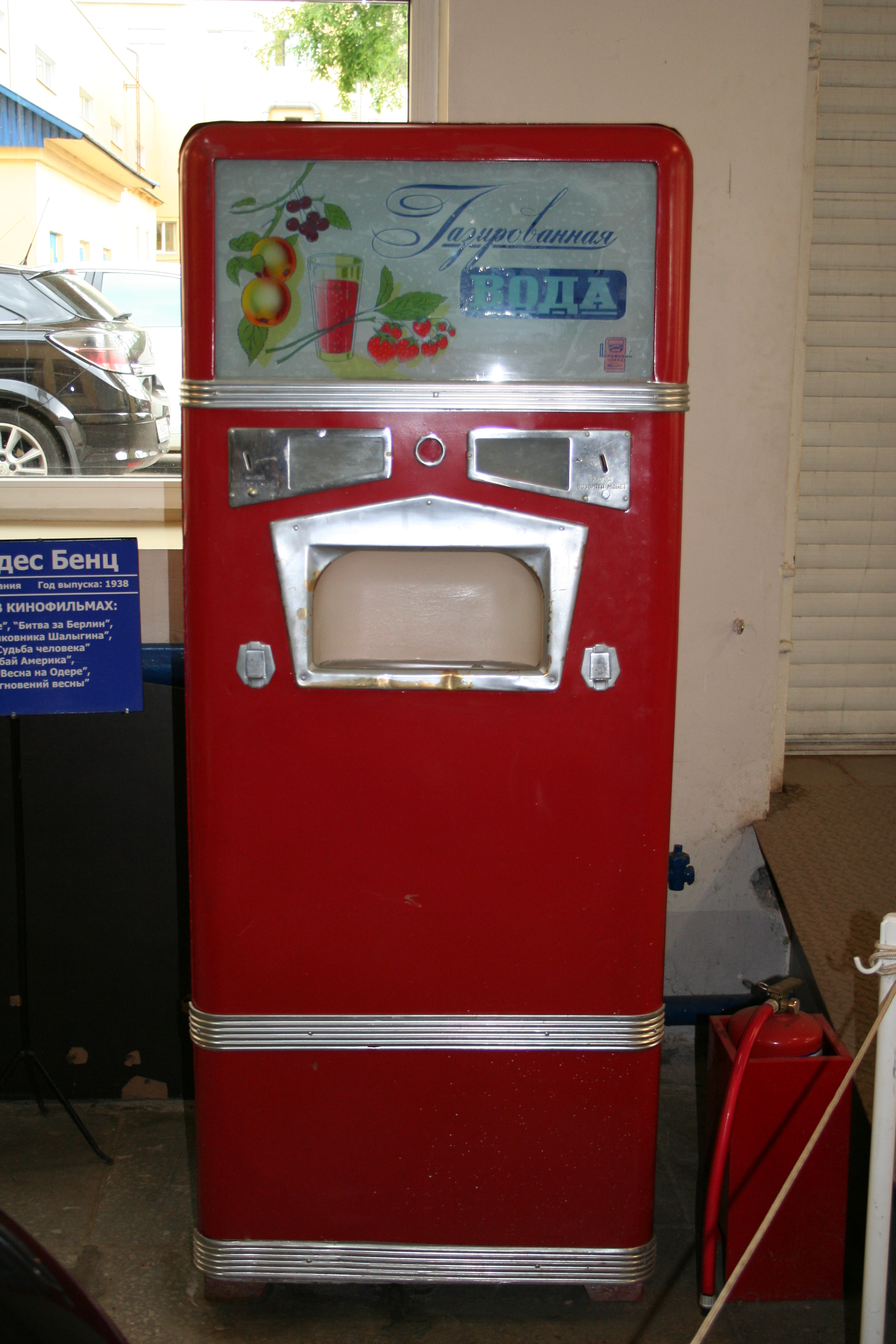 Museum auf dem Gelände des Filmstudios Mosfilm in Moskau. Die Exposition. Alter sowjetischer Wasserautomat.